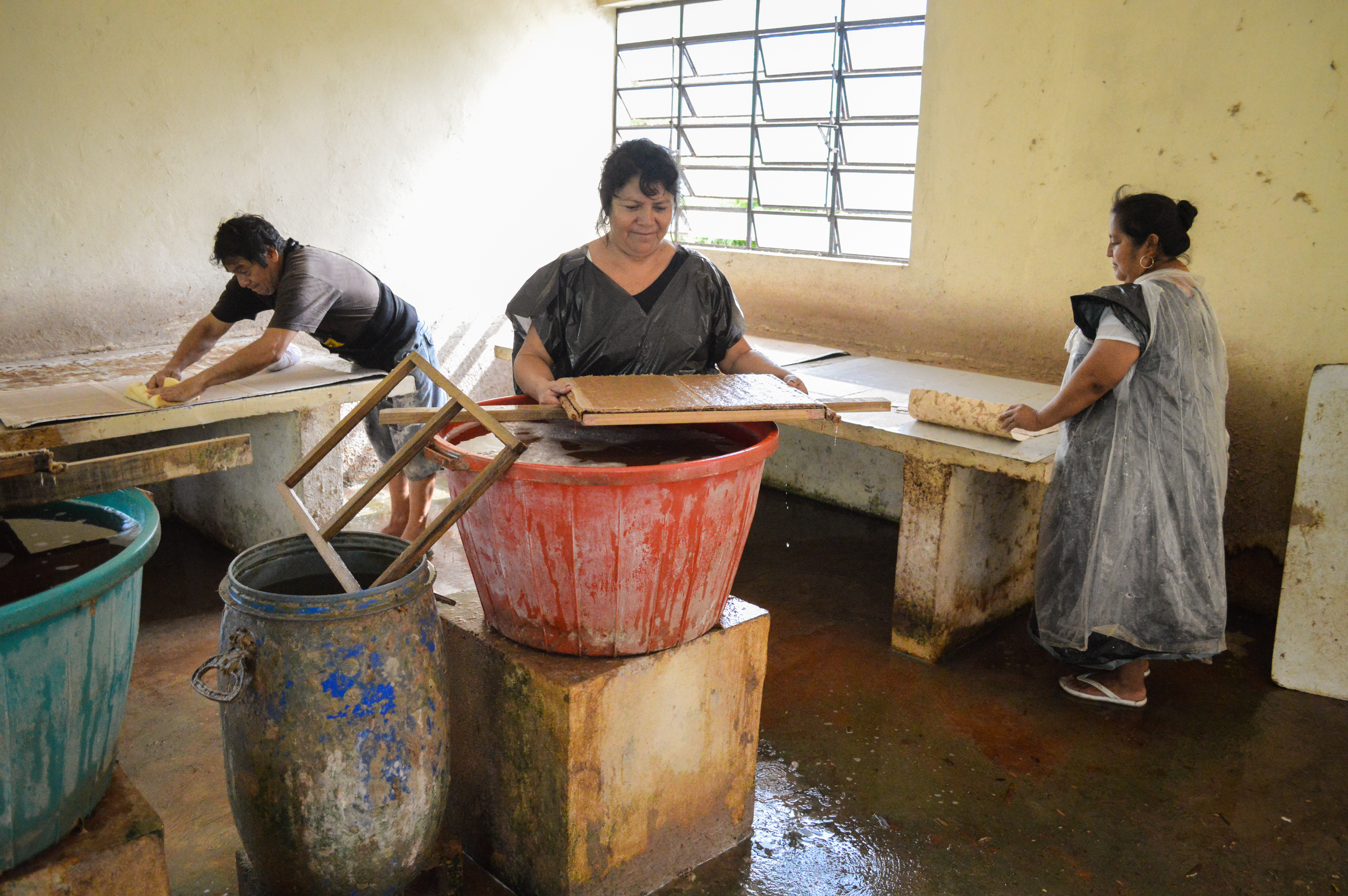 La elaboración de papel artesanal en Tetiz Yucatán lo hace un pequeño grupo de artesanos, las materias primas son el Tule (Typha Dominguensis) y la Sansevieria Trifasciata pero la conocen como "lengua de vaca". En la imagen se observa como una vez que está seco el tule lo proceden a triturar para que pueda ser mezclado con facilidad con la lengua de vaca posteriormente se les hecha agua y se ponen a cocer y se le agrega cloro en polvo, después se lava bien y se va dando vueltas a la mezcla la cual pasa por unos coladores y al salir queda como una especie de pulpa, el siguiente paso es sacar la pulpa con unos bastidores con una especie de malla con forma rectangular y medida ya sea como una hoja carta u oficio posterior la pulpa ya con forma rectangular se colocan en unas laminas de metal y se dejan secar al sol el ultimo paso es despegar el papel